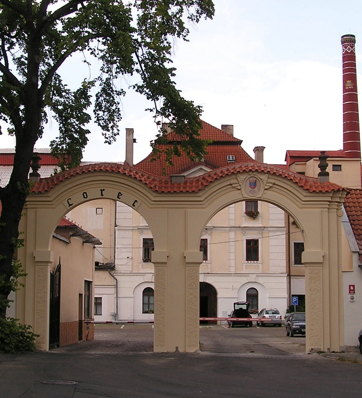 Kutná Hora Brewery